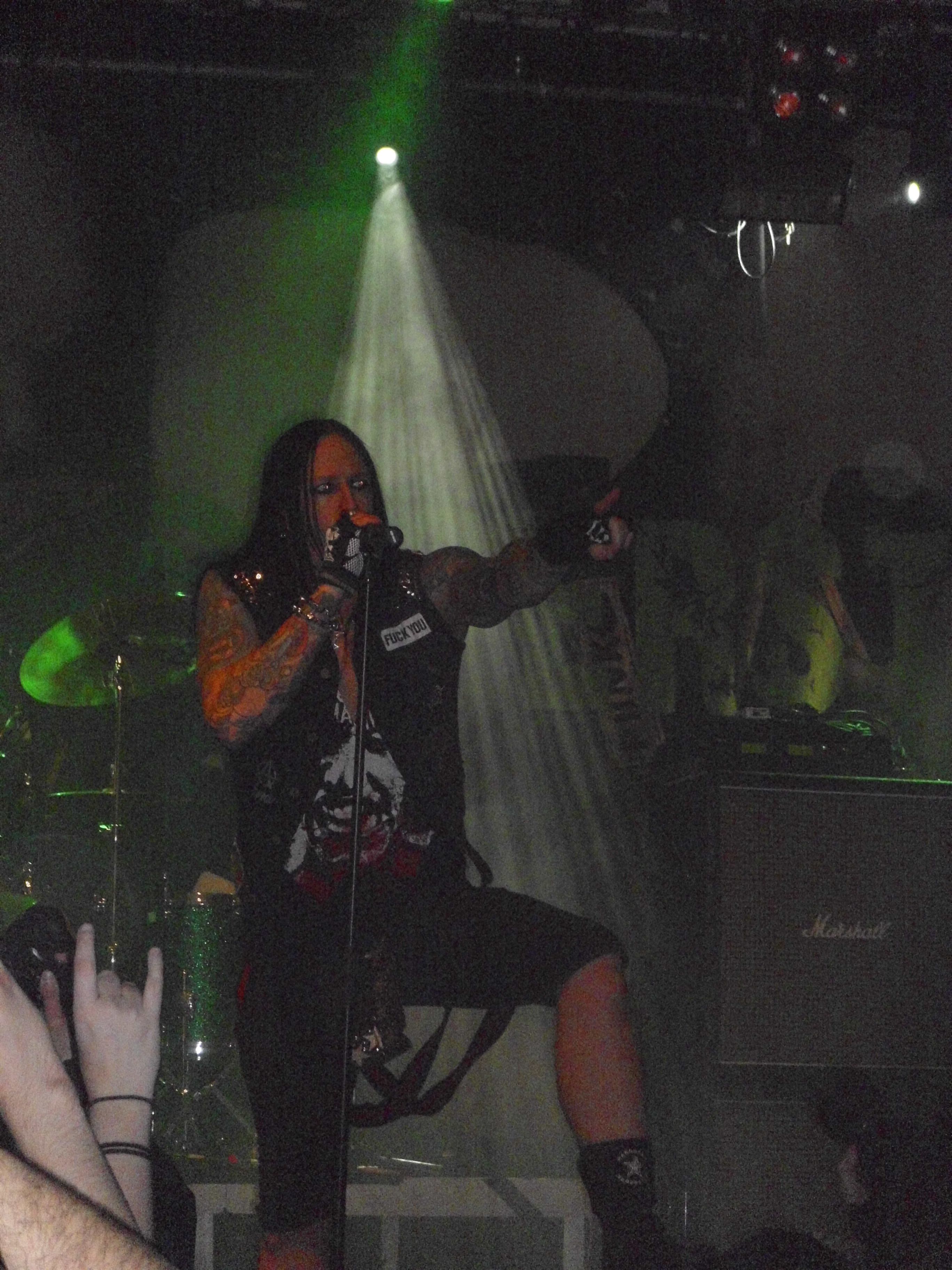 Hardcore Superstar-Konzertfoto